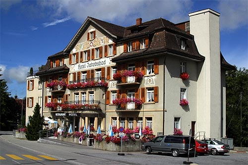 Hotel "Jakobsbad" im Weiler Jakobsbad bei Gonten